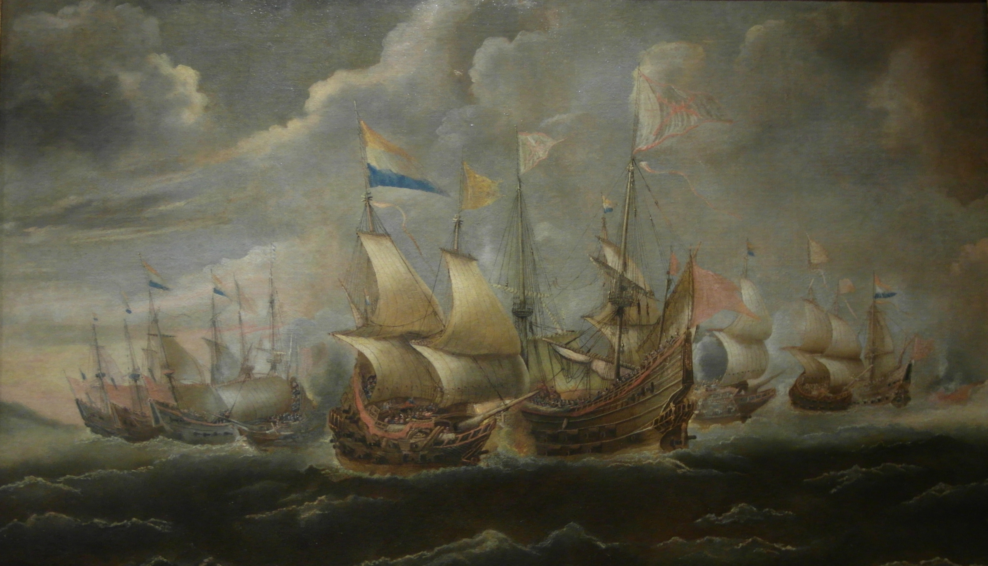 El lienzo, que es una obra de la escuela flamenca u holandesa, representa la batalla de las Dunas, que se libró en 1639 y supuso un grave desastre para la armada Española, que perdió en ella 43 naves.